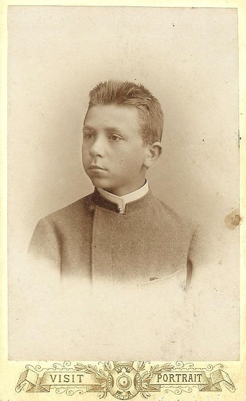 Константин Попов - выпускник Муромского духовного училища 1898 года